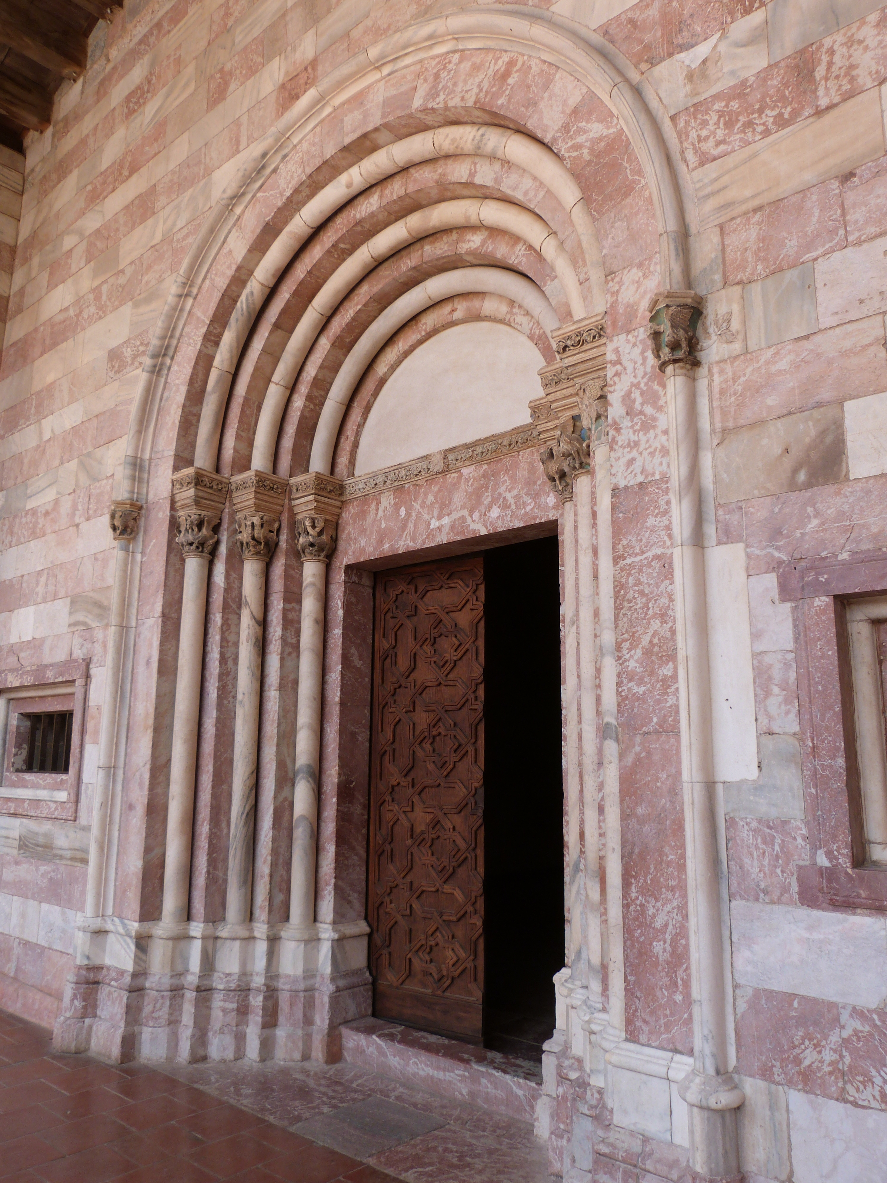 This building is en partie classé, en partie inscrit au titre des Monuments Historiques. .